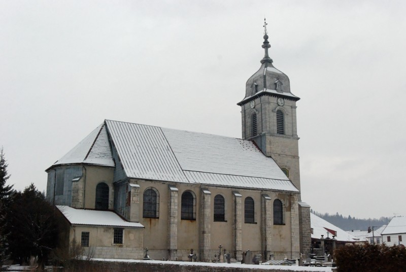 L'église de Mouthe